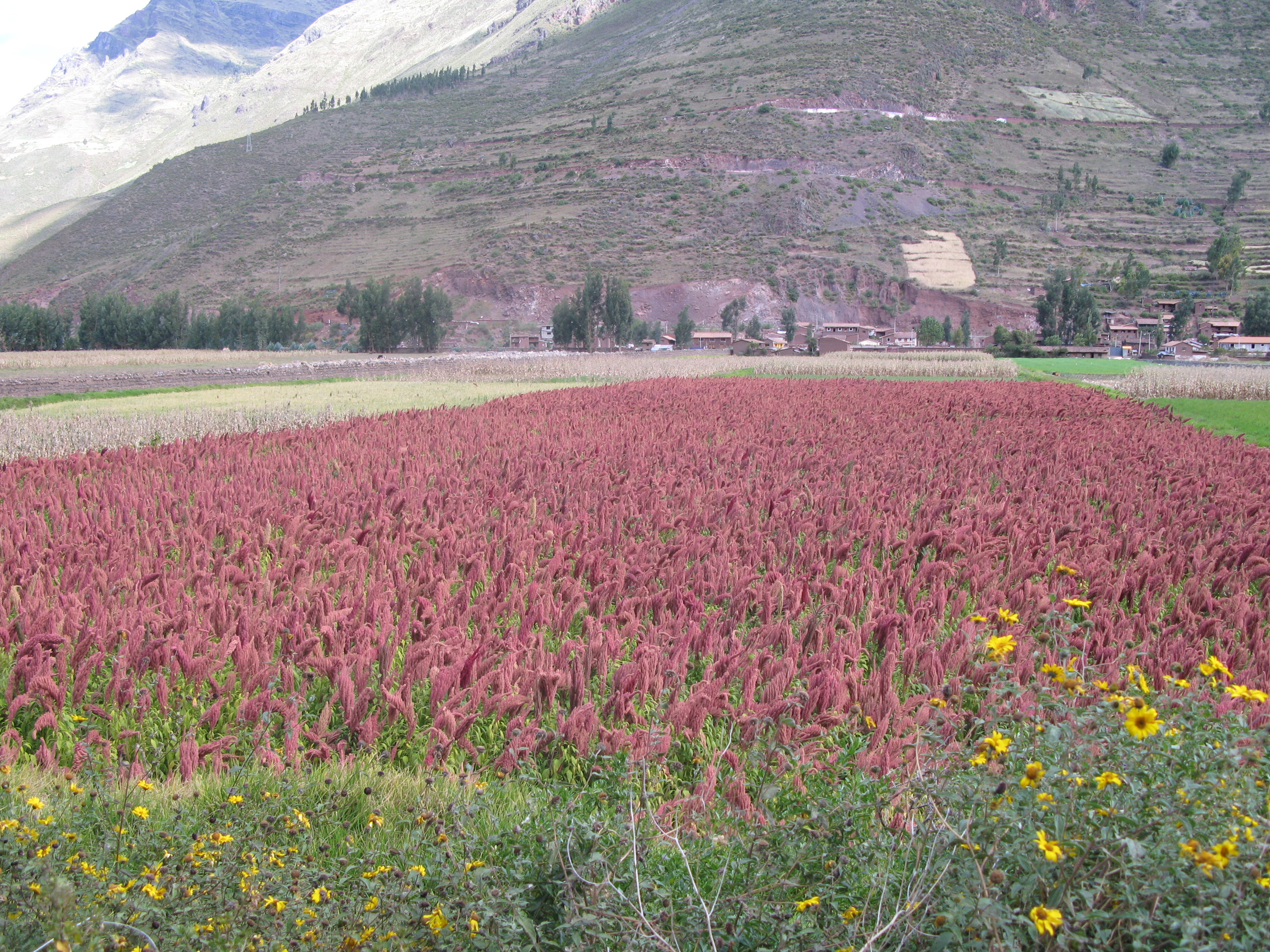 Kinua - inkovski riž